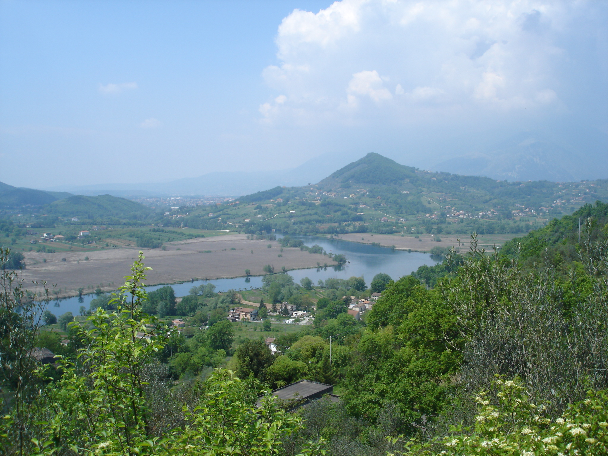 Lago di Posta Fibreno e Colle Monacesco